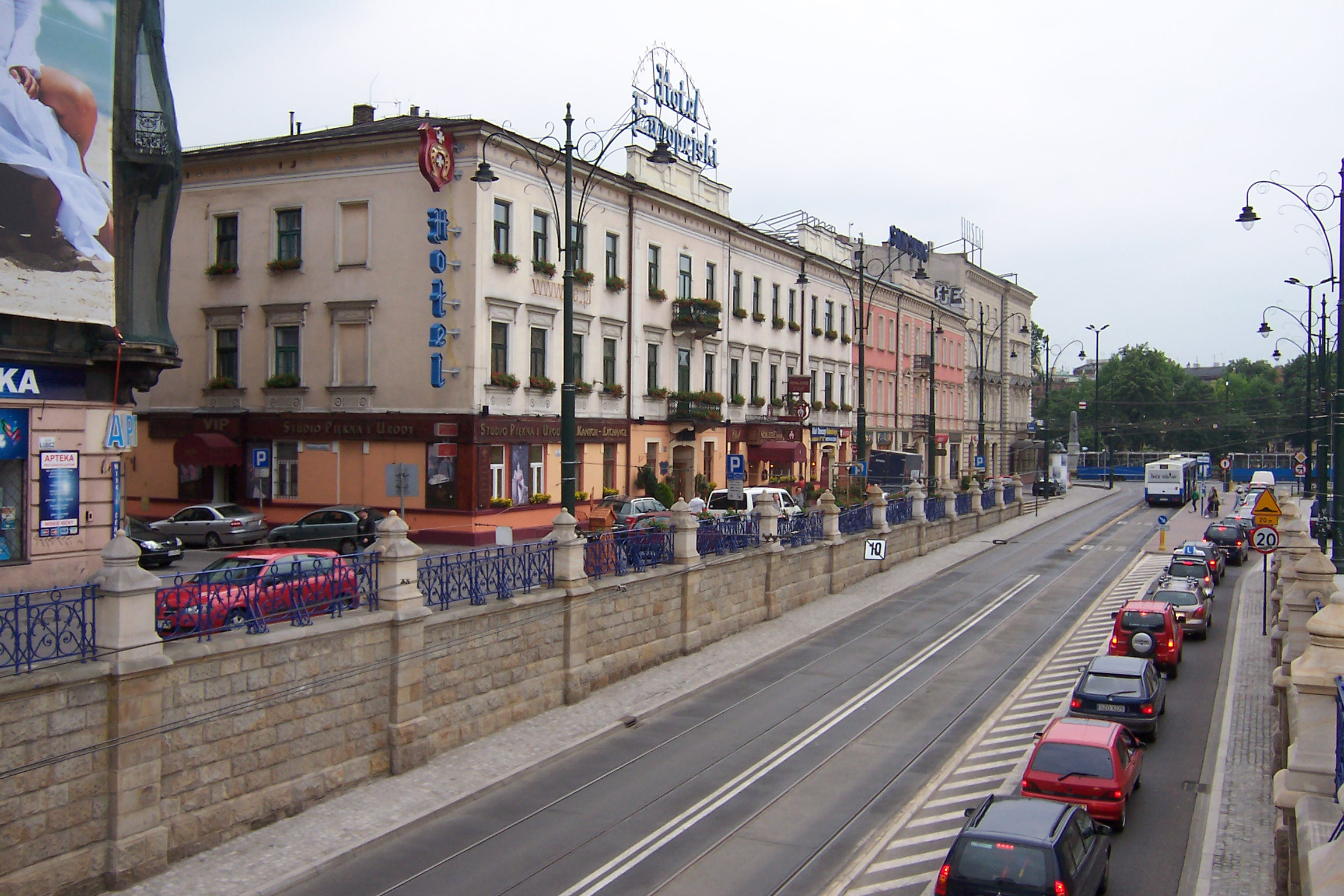 Lubicz Street, Cracow, Poland / ulica Lubicz, Kraków, Polska